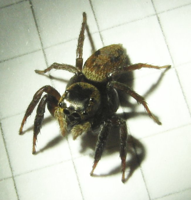 Female adult Hasarius adansoni, caught in Cologne Zoo Aquarium. One square measures 5 millimeters.